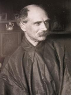 Siegfried « Samuel » Bing (1838-1905), en kimono, pris en photo dans sa galerie, avant 1895.